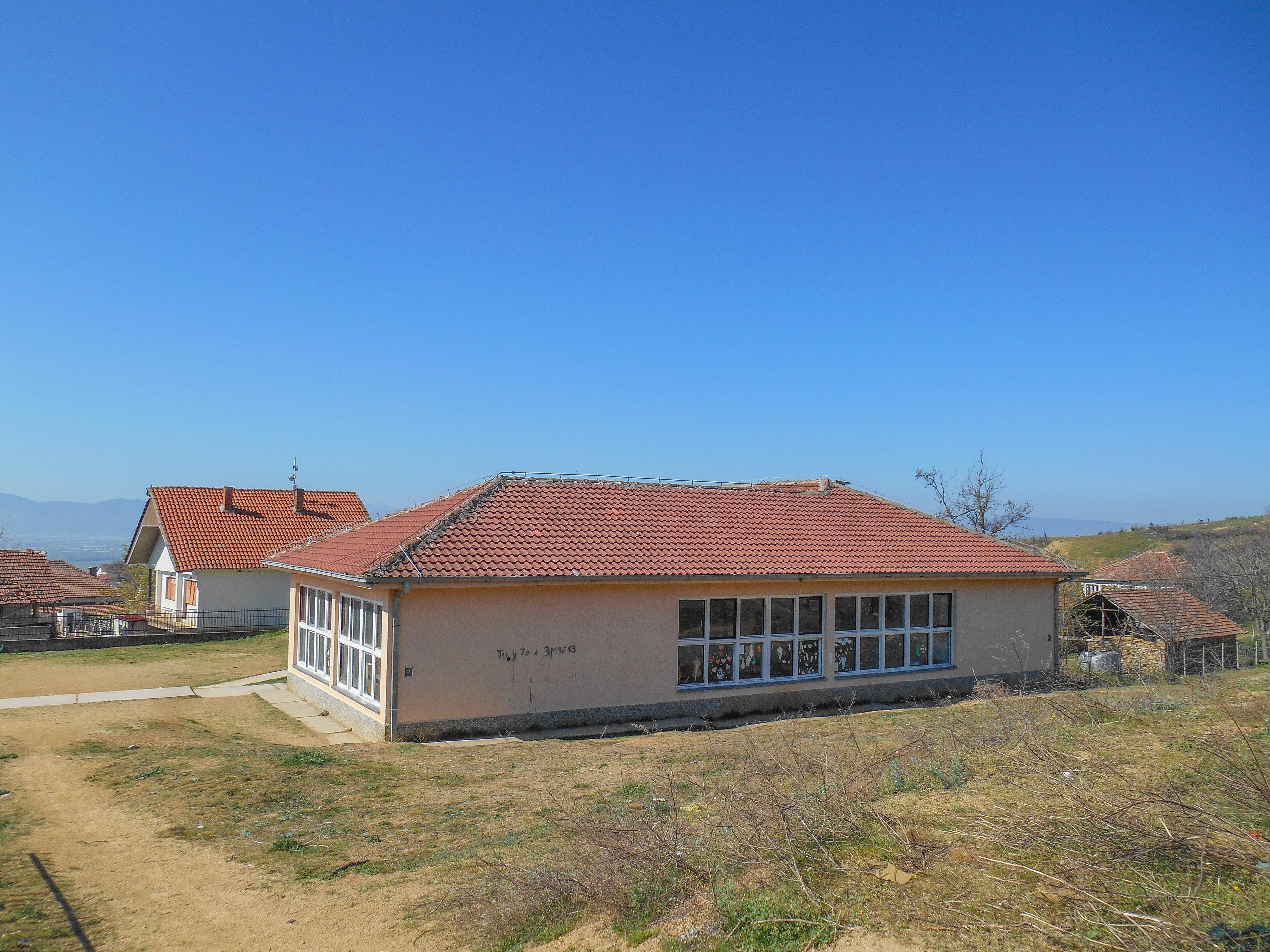 Основно училиште „Гоце Делчев“ - Дрвош